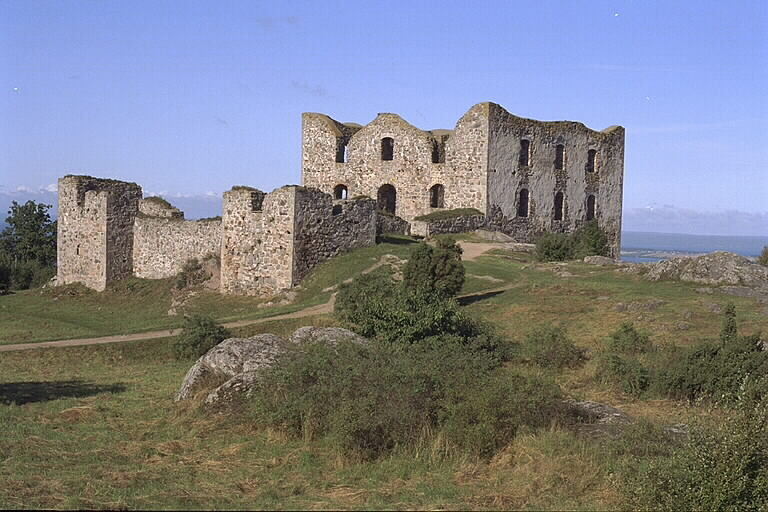 Motiv: Brahehus Nyckelord: Riksintressen Kategori: Slott/herresäte .